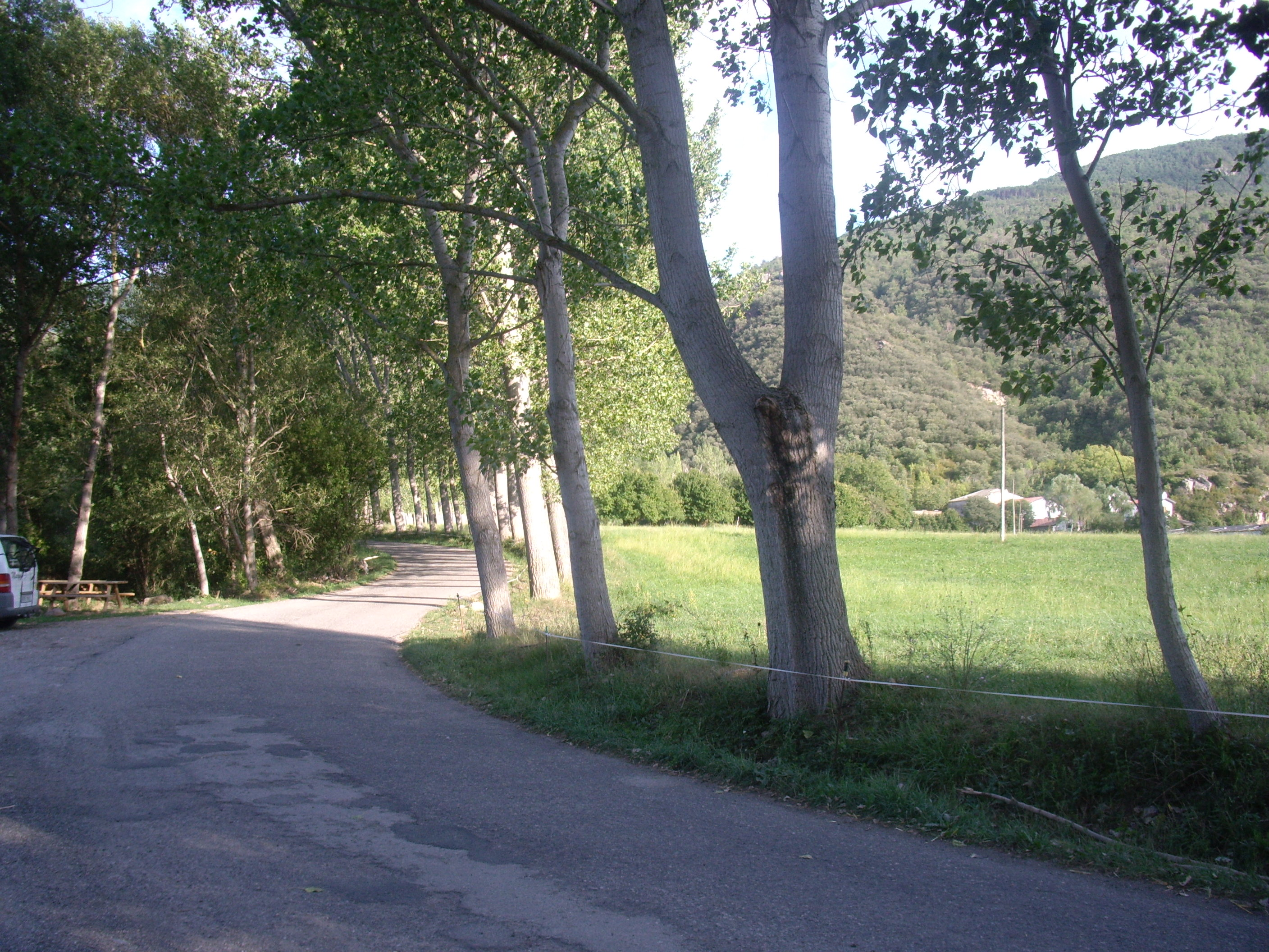 Foto de la carretera LV-5131, al seu començament